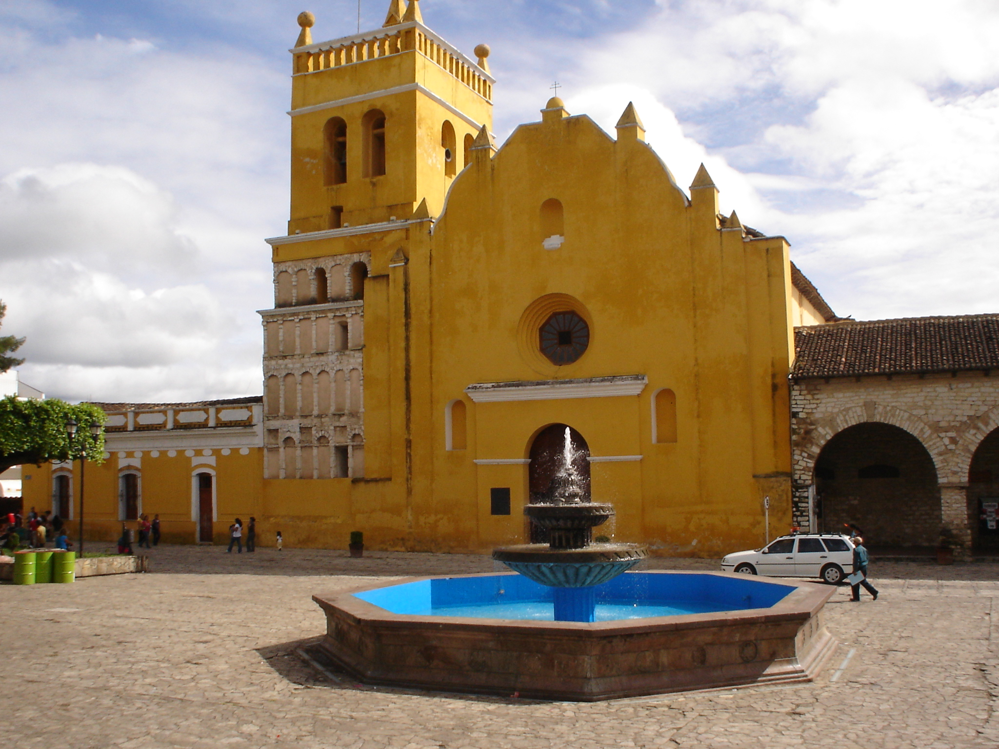 iglesia Sto. Domingo.Comitan es una ciudad situada en el sur de país, su nombre significa lugar de alfareros (komitl-tlan), es uno de los municipios más importantes del estado de Chiapas, es considerada como ciudad colonial por sus construcciones y su historia. Esta muy cerca de la frontera con Guatemala, su clima es templado y se caracteriza por sus regionalismos, su gastronomía y por la calidez de su gente. Ya somos este año 2012, Ciudad Cultural. Un atractivo turístico es la iglesia de Santo Domingo de Guzmán, situado en el centro de la ciudad, patrono del lugar y se festeja el 4 de agosto con la feria del pueblo. Y es uno de los atractivos turísticos y más referidos en el mundo. La fuente que lo decora lo acompaña en la fotografía que viaja a muchos cientos de kilómetros de este paraíso cultural e histórico.